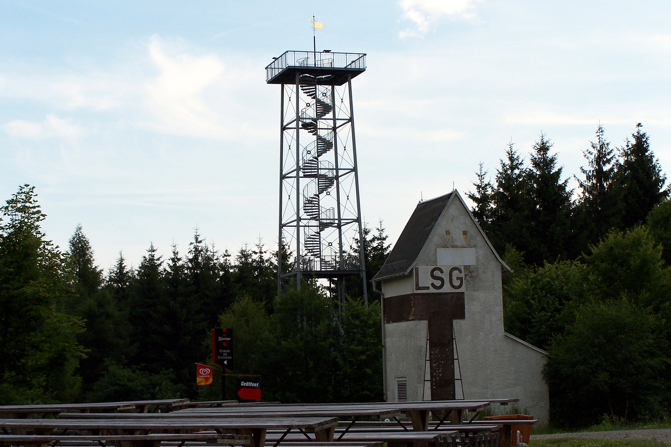 Das Foto zeigt den Maria-Josepha-Turm auf dem Totenstein bei Chemnitz.